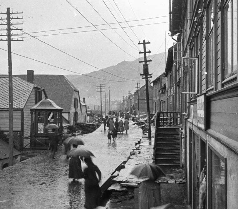 Lluís Llagostera i Pascual